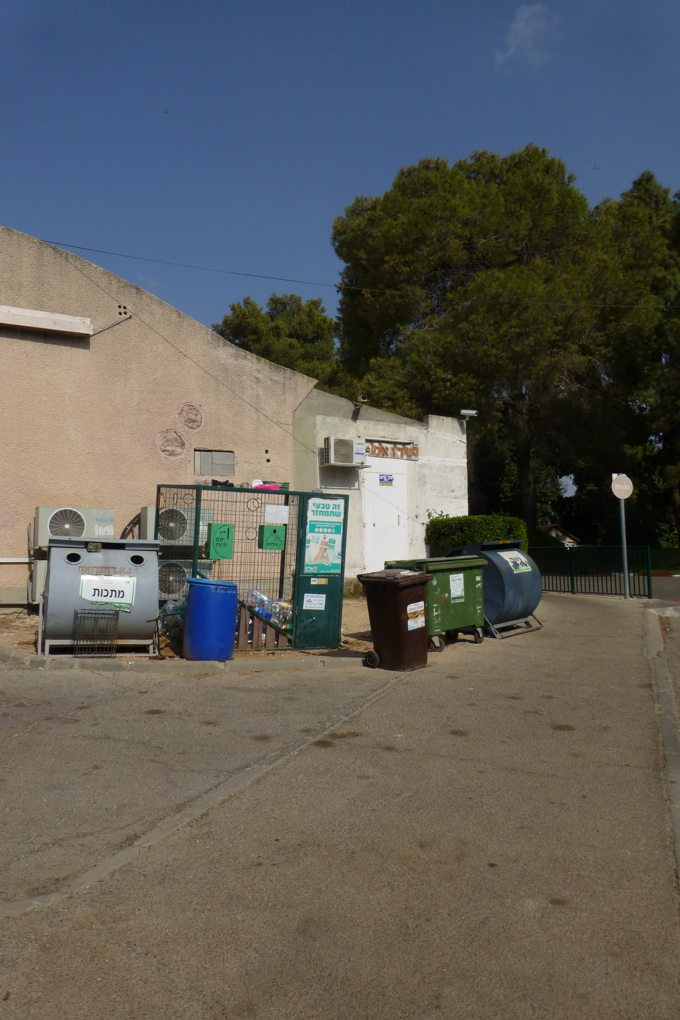 מוזיאון אוצרות